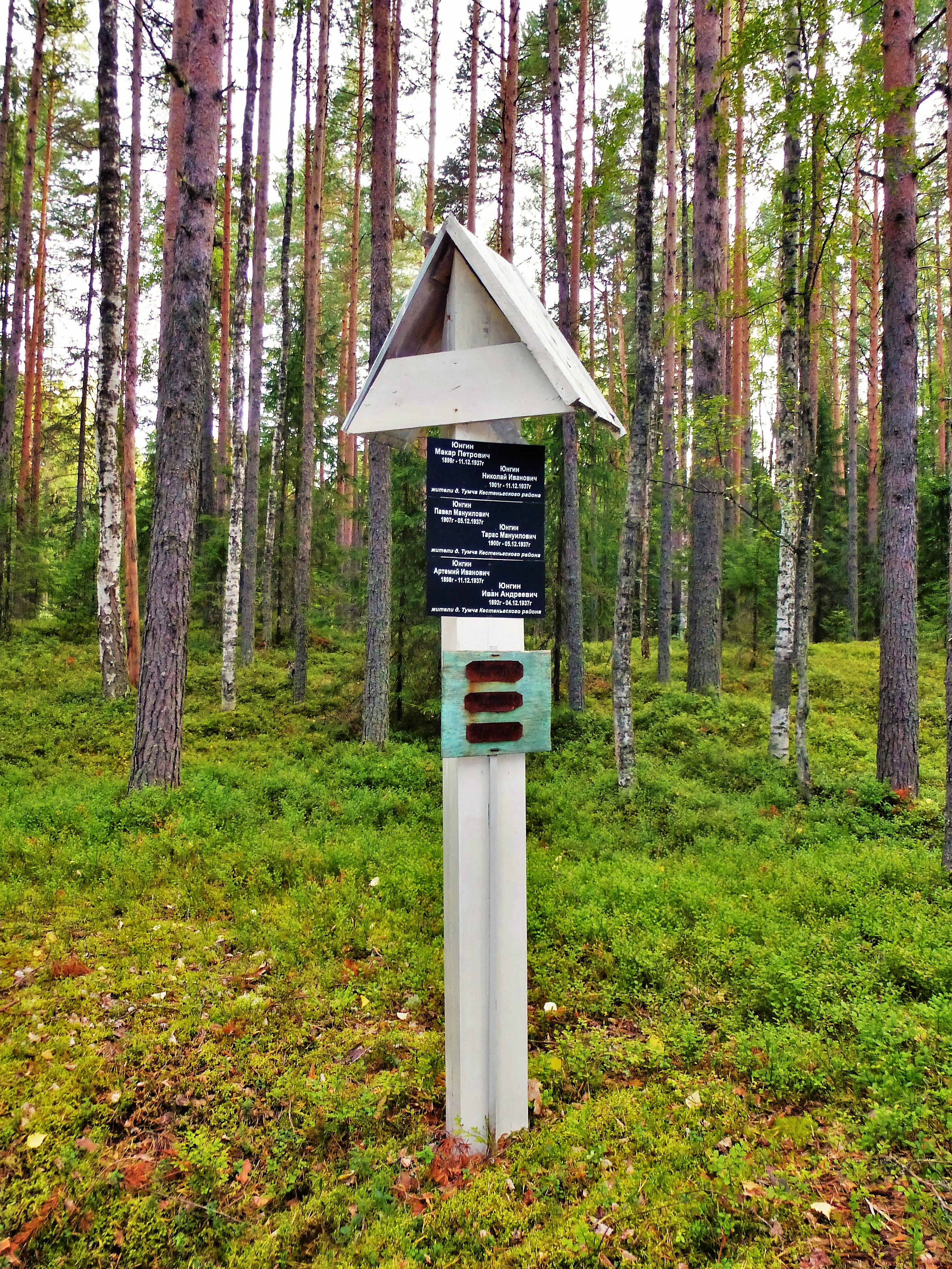 Поклонный крест жертвам массовых репрессий 1937-1938 г.г. в местечке "Красный Бор" под Петрозаводском.